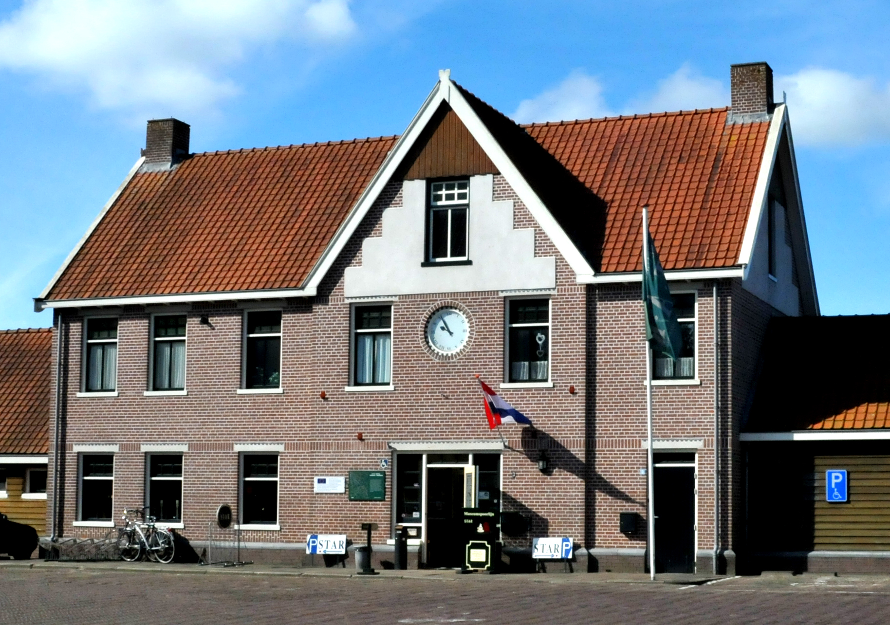 STAR-station Stadskanaal.